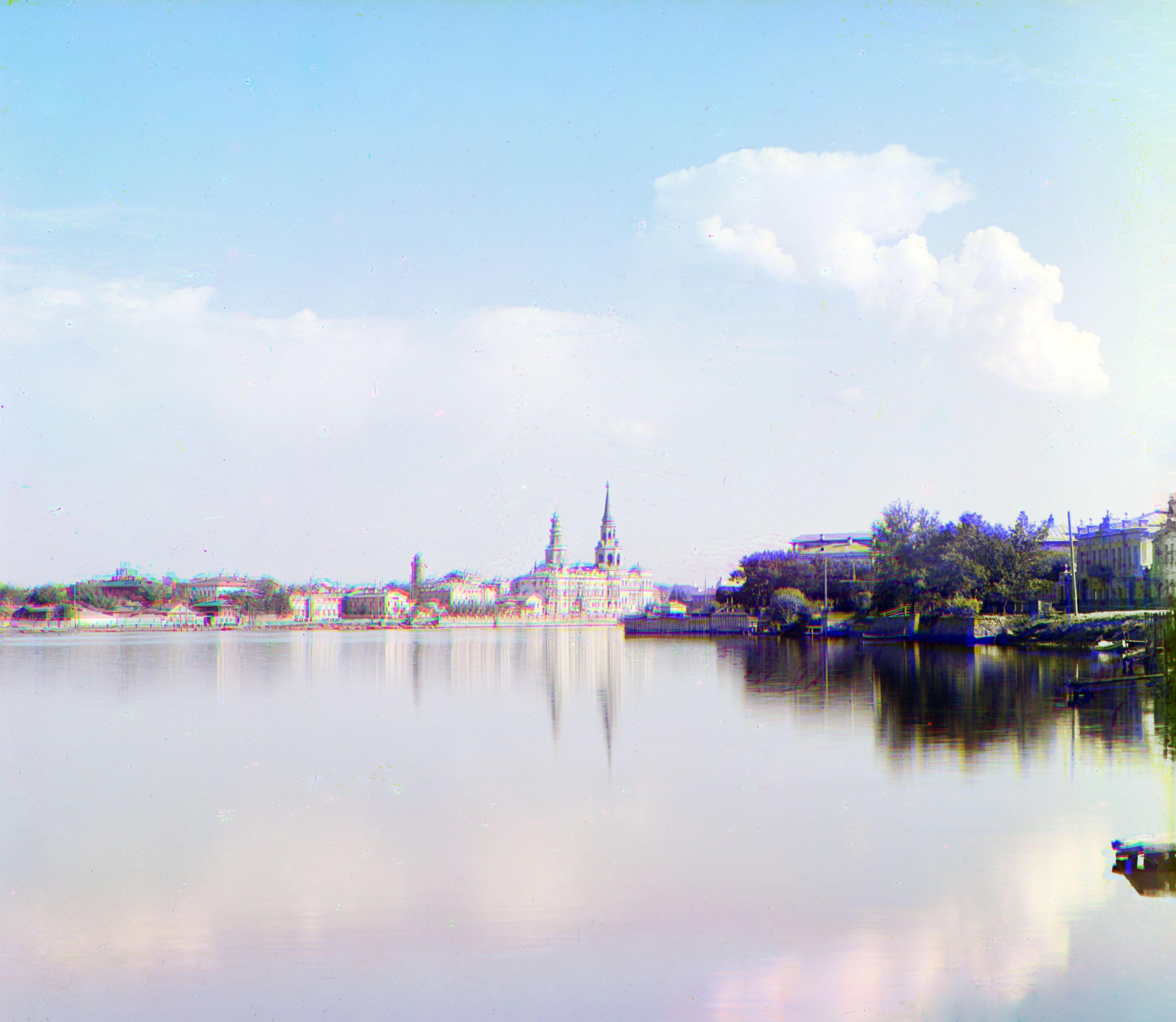 Городской пруд, вдали возвышается Екатерининский собор (в советское время был разрушен)